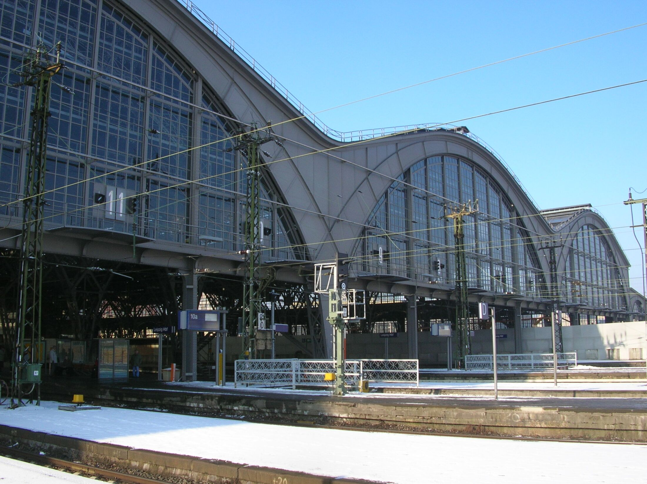 Bildbeschreibung: Außenansicht des Leipziger Hauptbahnhofes, vom Gleis 13 Außenbahnsteig Quelle: selbst photographiert Fotograf/Zeichner: Substitutor Datum: 04. März 2006